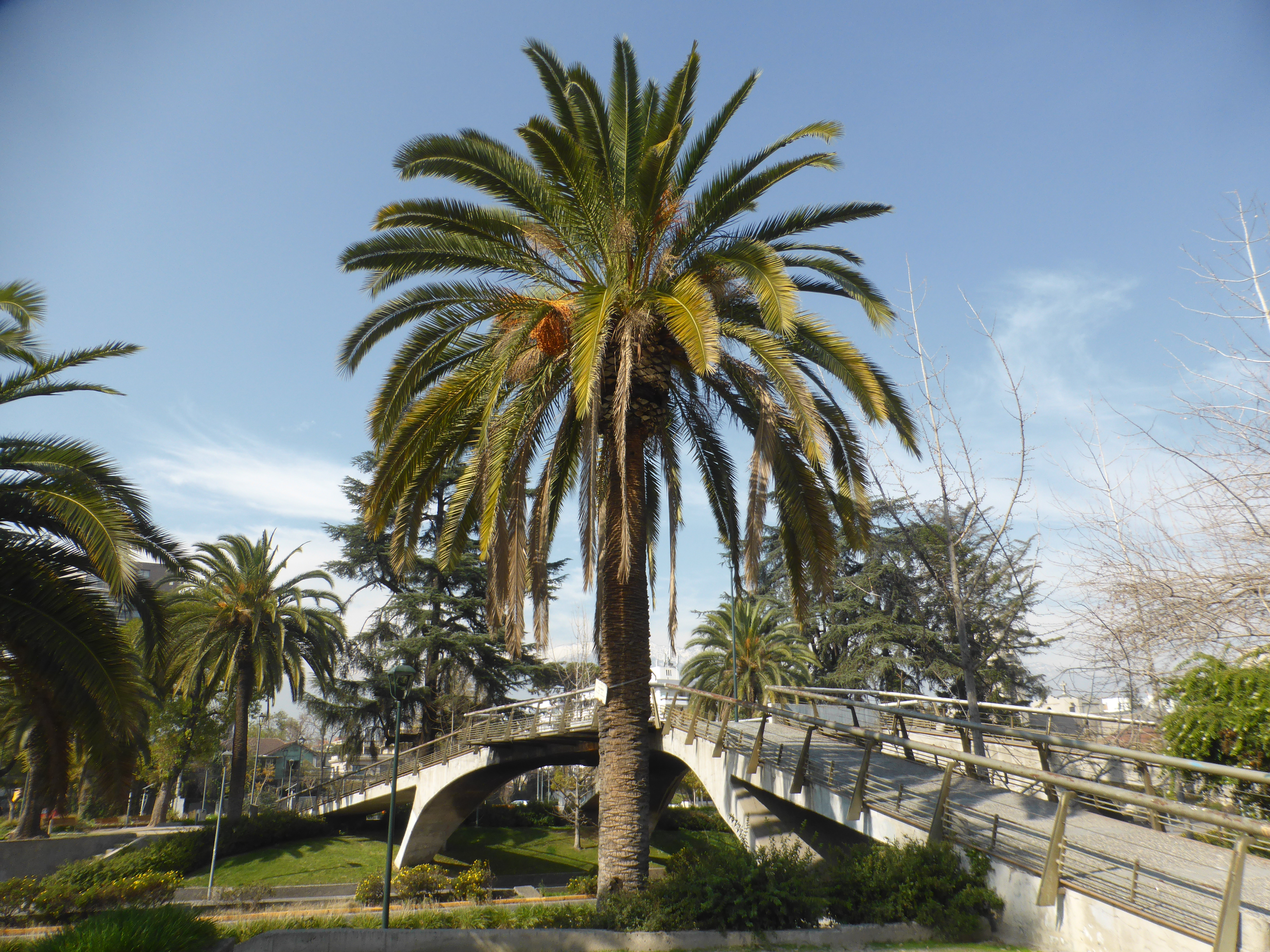 Palmera canaria Phoenix canariensis, junto a la pasarela peatonal sobre la avenida Pedro de Valdivia.